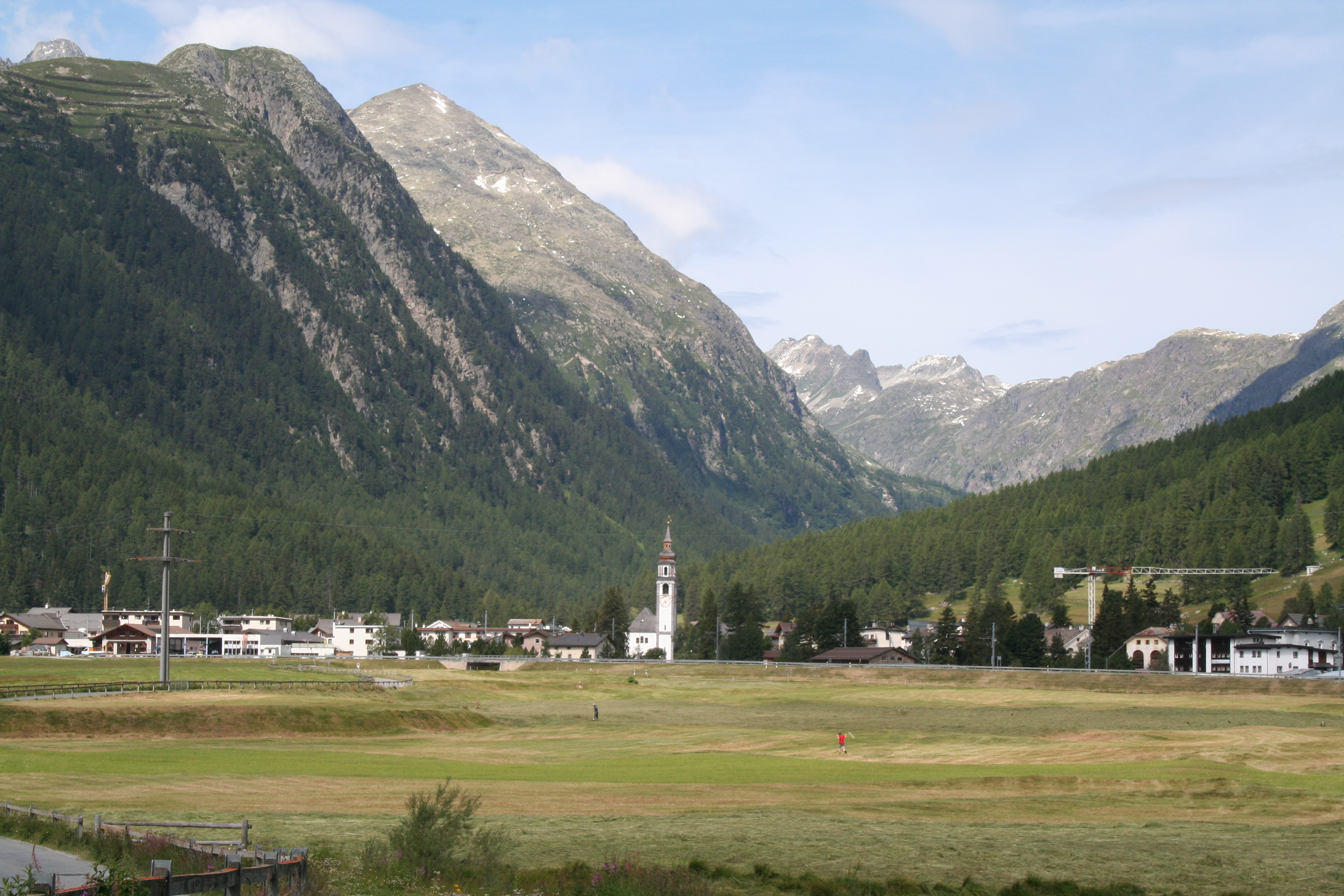 Bever, Ansicht von Süden